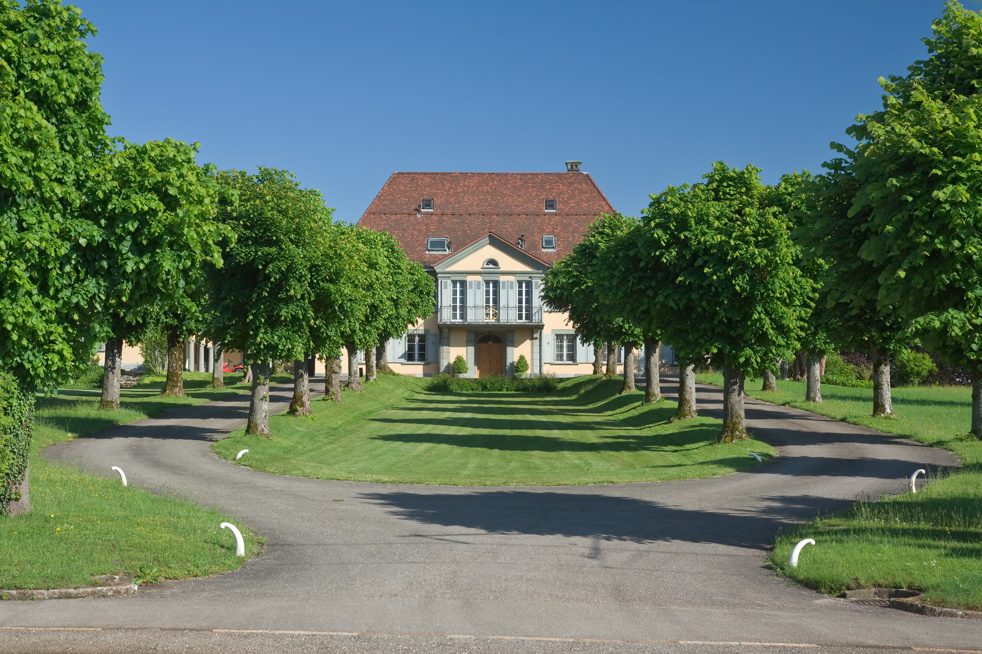 Villa an der Baselstrasse 2 in Feldbrunnen-St. Niklaus, Schweiz